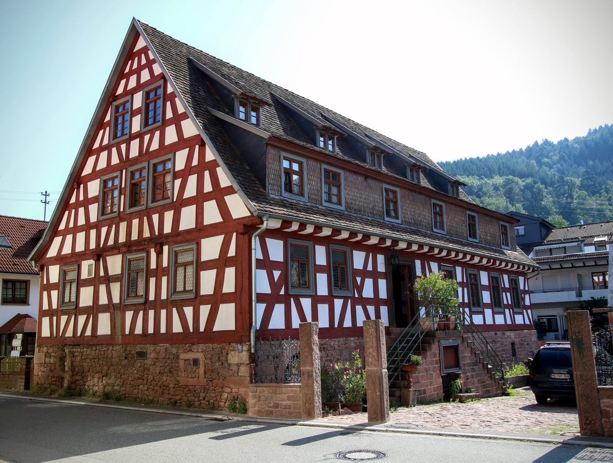 Heiligkreuzsteinach, Landgasthof Roter Löwe